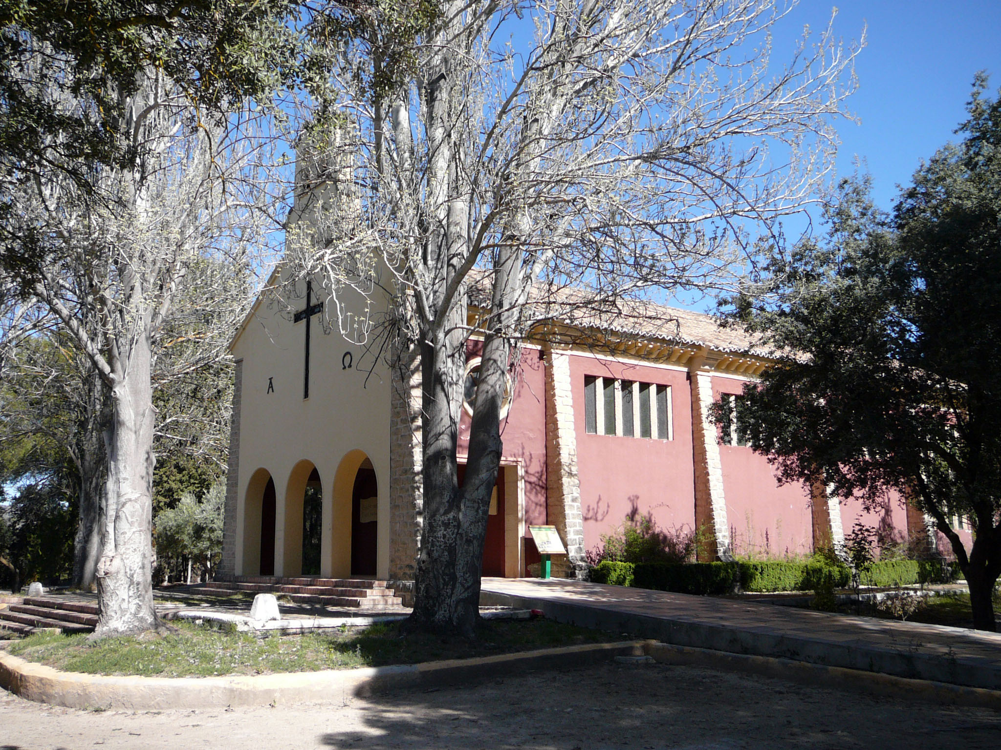 Iglesia Parroquial de la Inmaculada, en la localidad de Pantano de los Bermejales, municipio de Arenas del Rey (Granada, España).